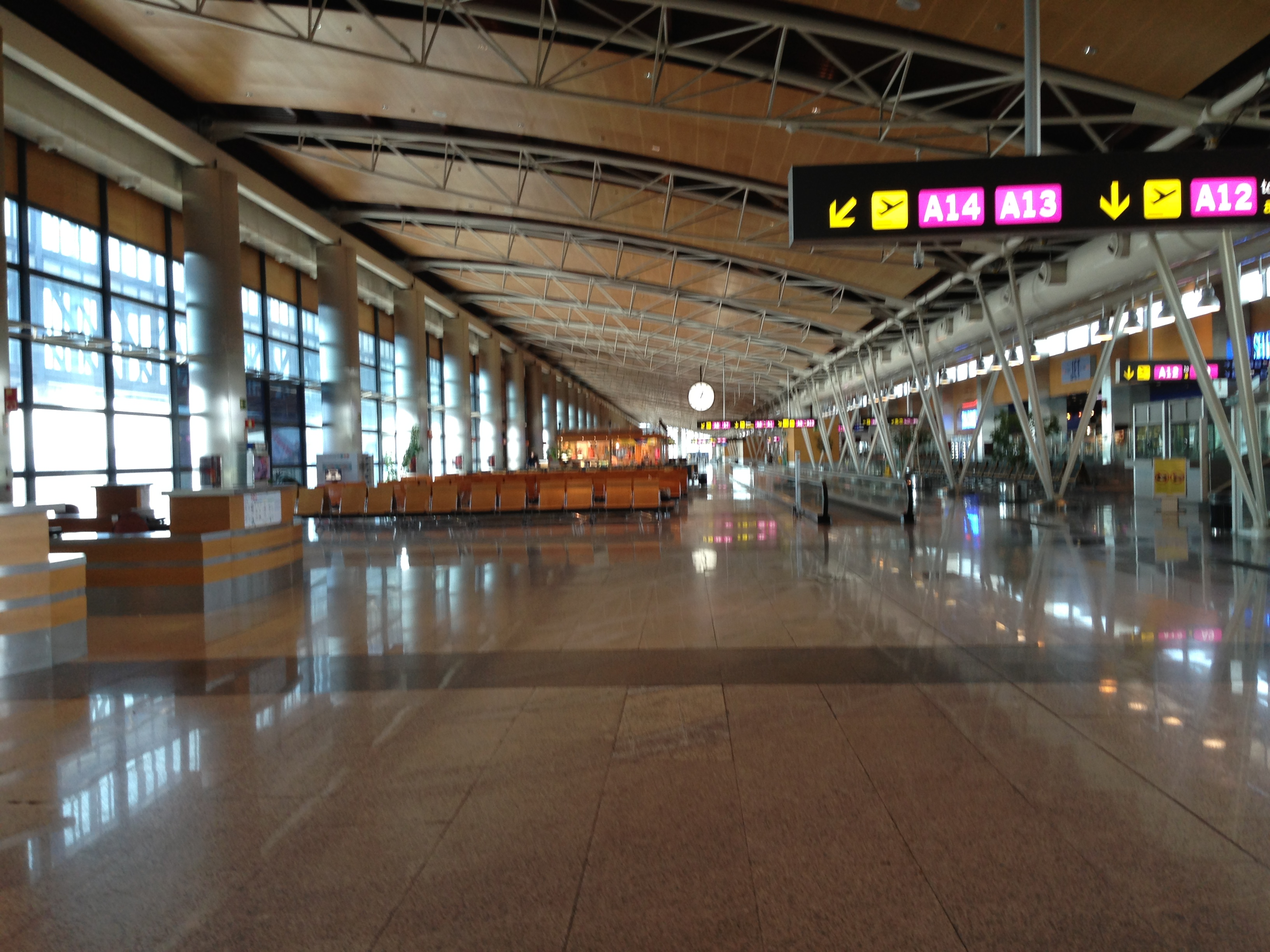 Dique Sur de la Terminal 1. (Zona internacional).